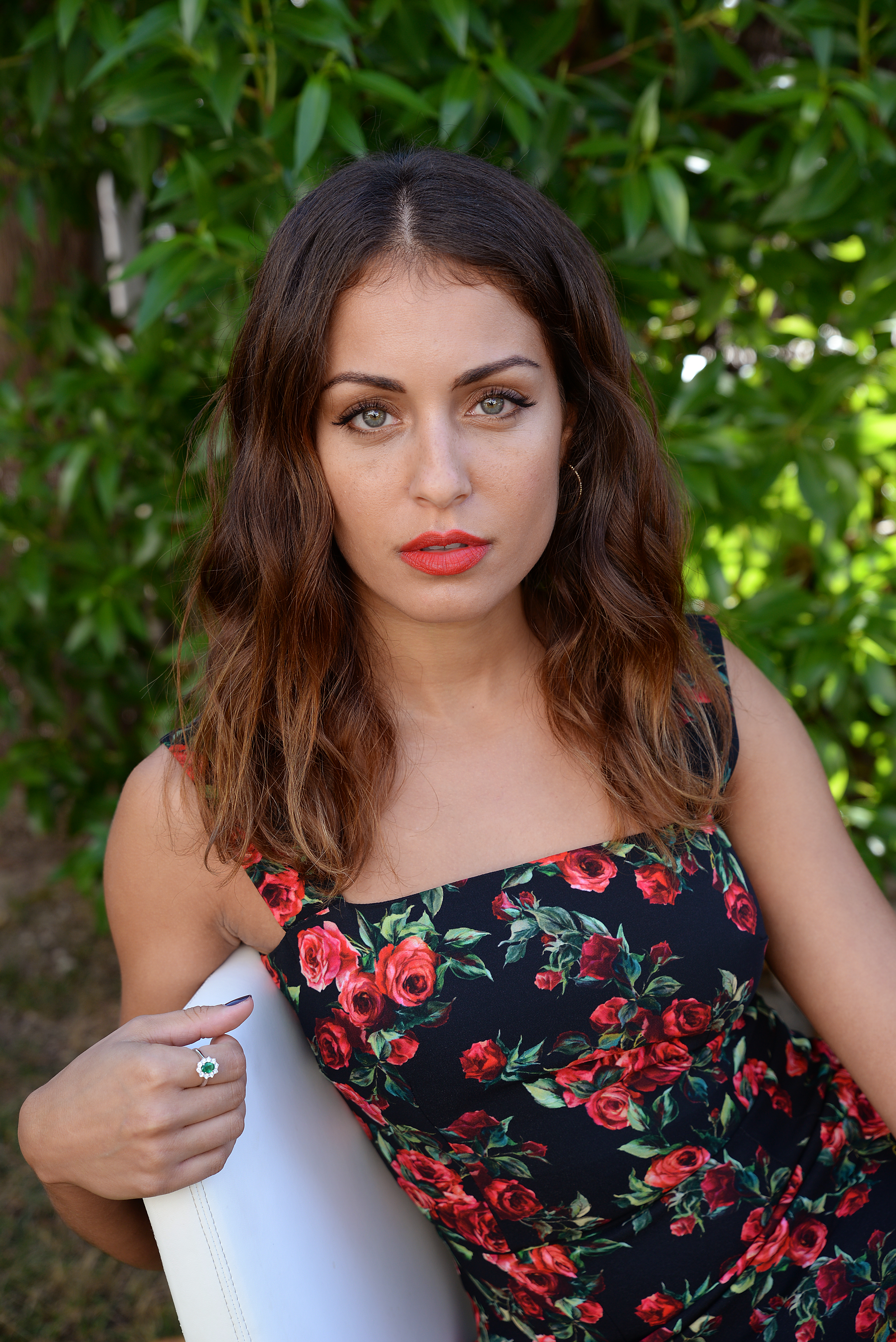 Hiba Abouk, fotografiada durant el Festival Internacional de Cinema Fantàstic de Catalunya (Sitges, 2017)